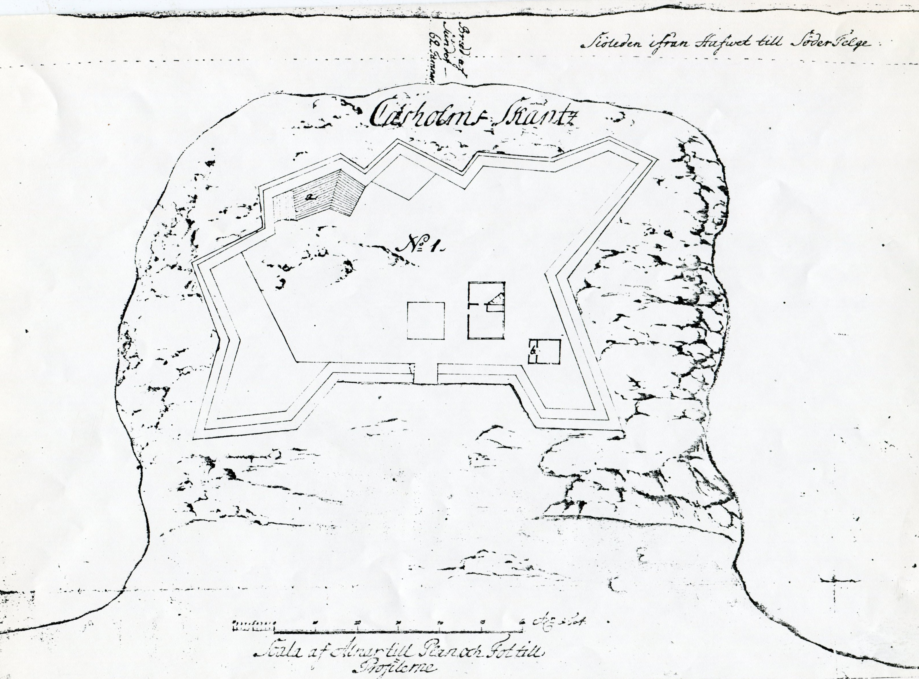 Ritning över Kasholms skans i Södertälje kommun